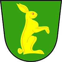 Prosiměřice - znak obce.